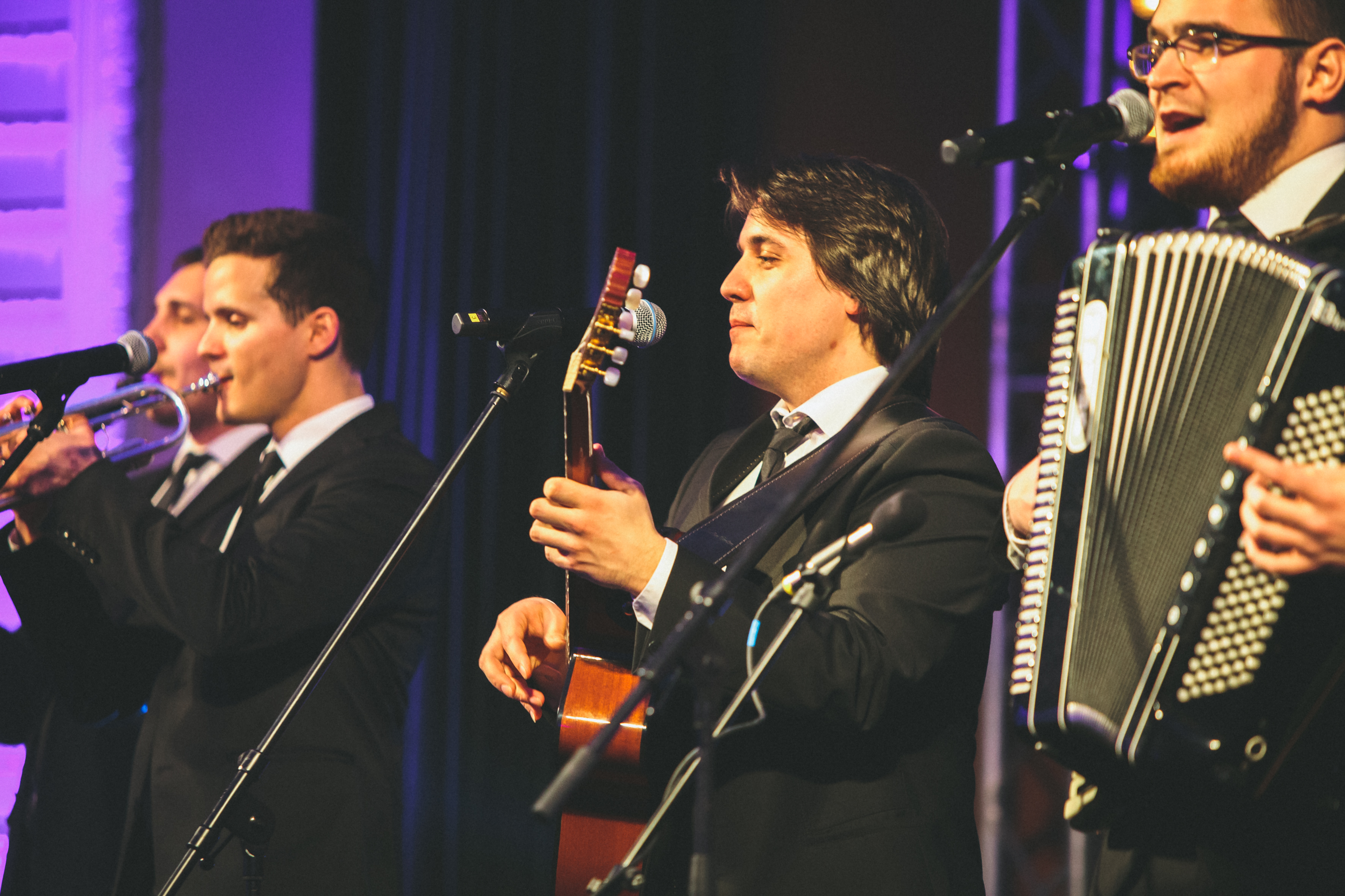 Projekt Volkswagen Špila je namenjen mladim glasbenim zasedbam.